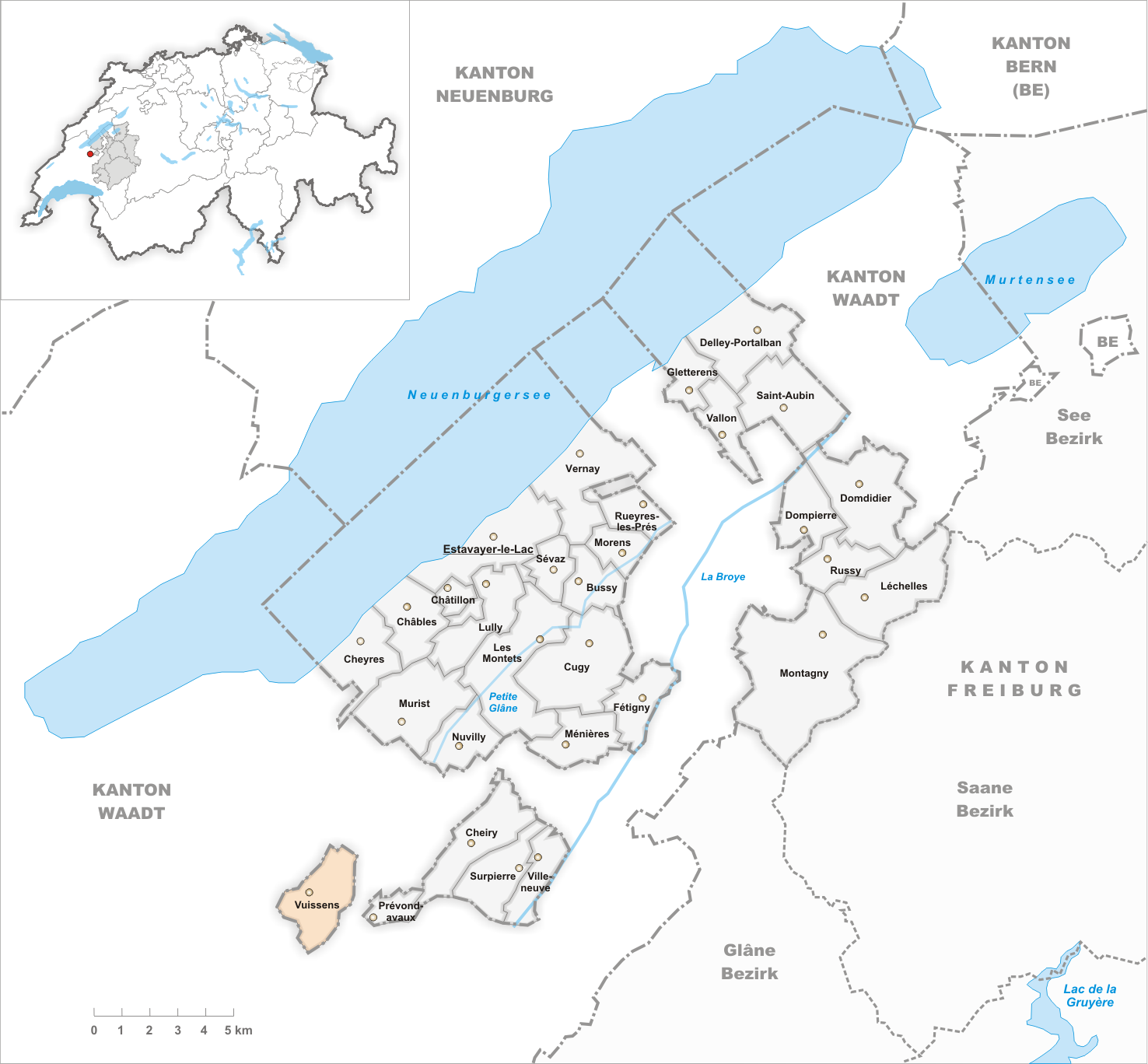 Municipality Vuissens